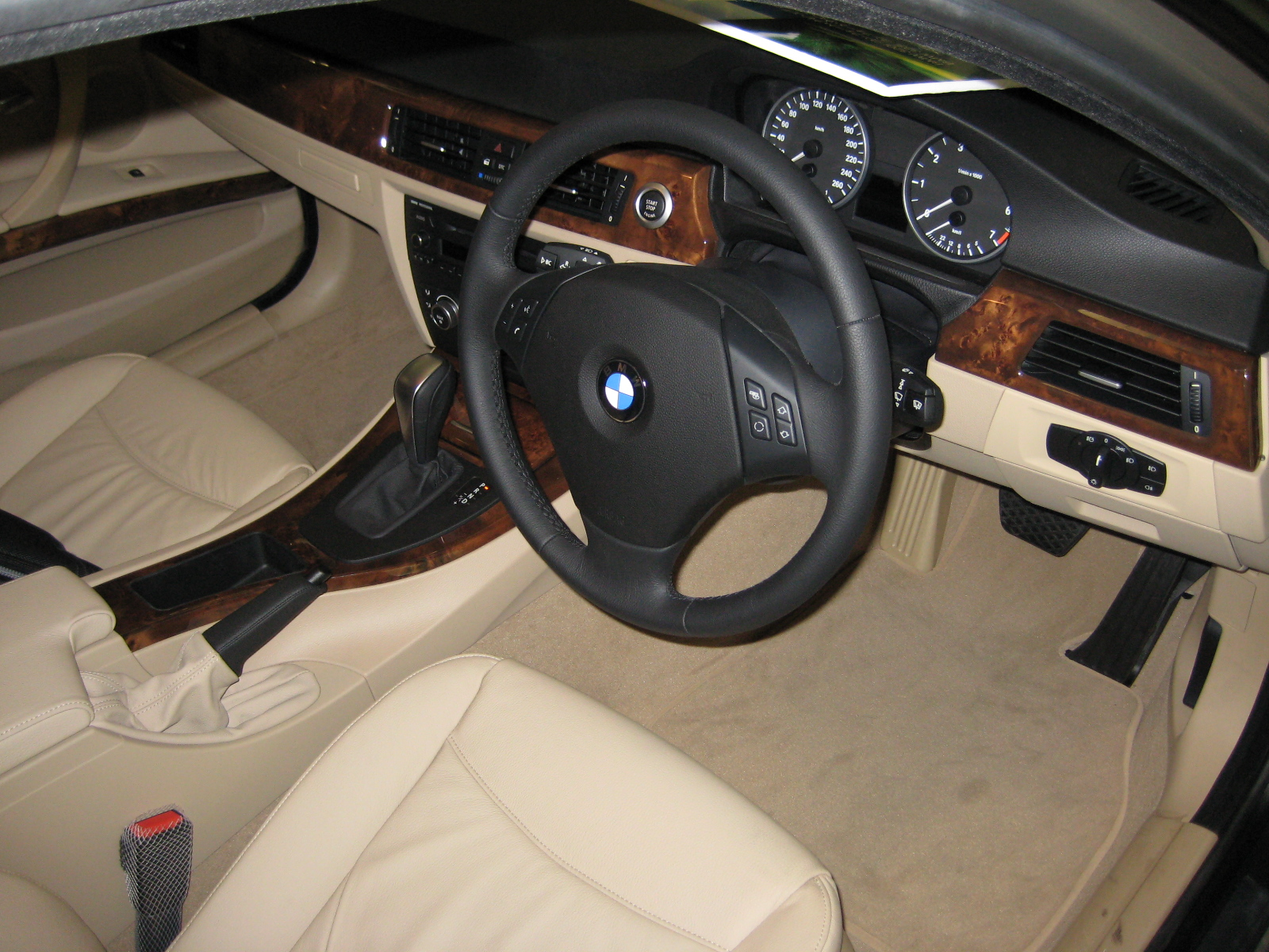 BMW E90 320i Interior